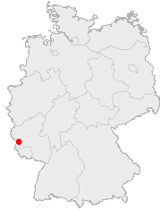 Newel op der Kaart